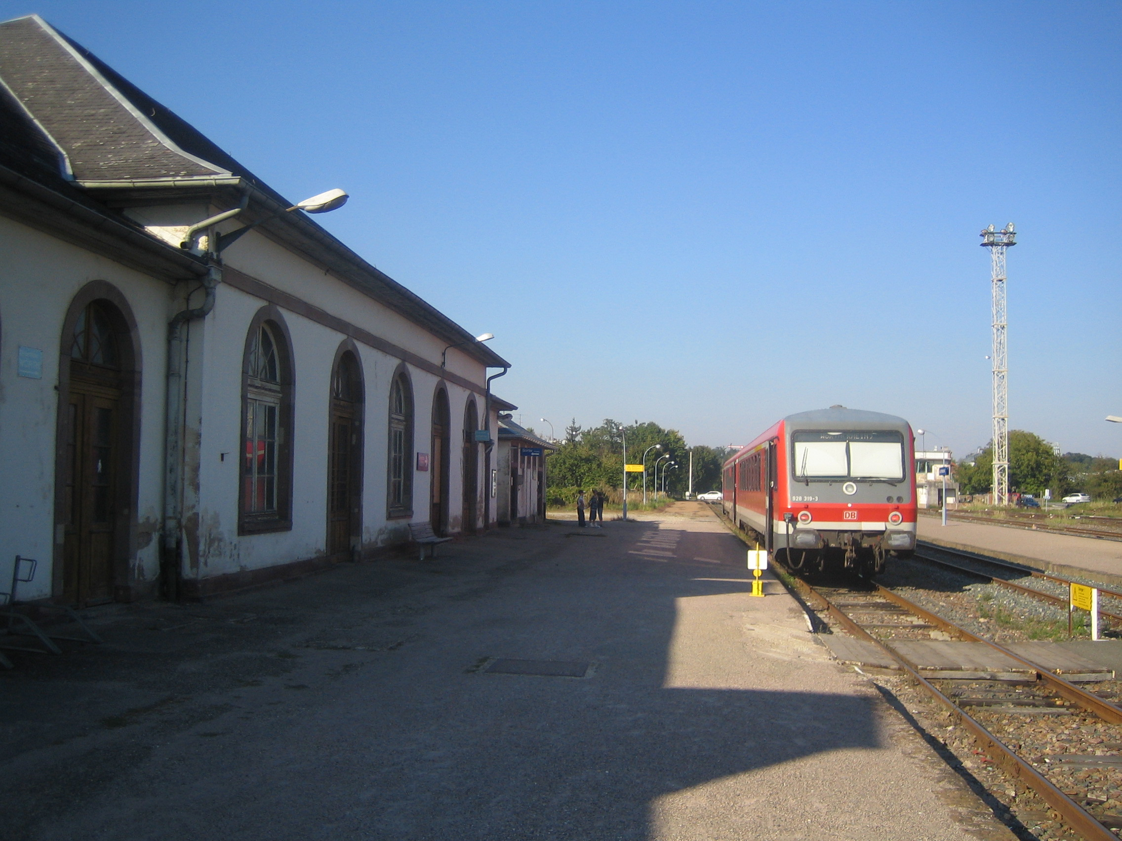 Bf. Lauterbourg, selbst fotografiert